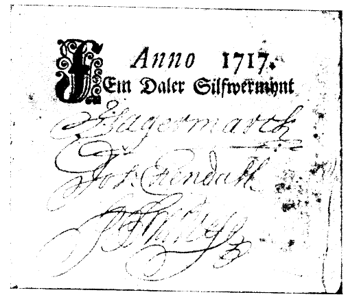 sedel 5 daler smt från 1717.